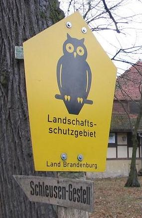 Schild Landschaftsschutzgebiet an der Parforceheide, Jagdschloss Stern, Potsdam, Brandenburg